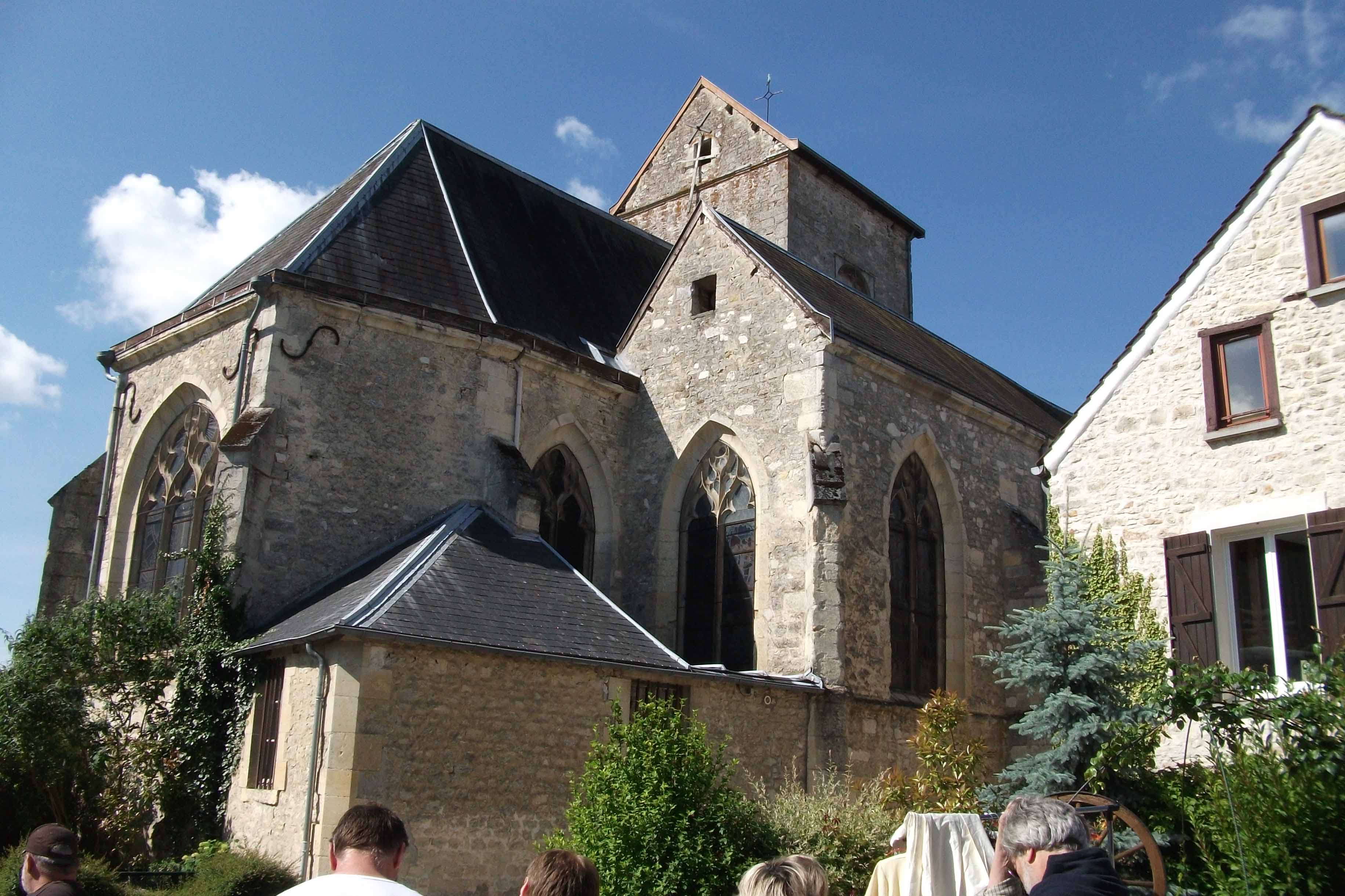 Eglise du village de Trigny.